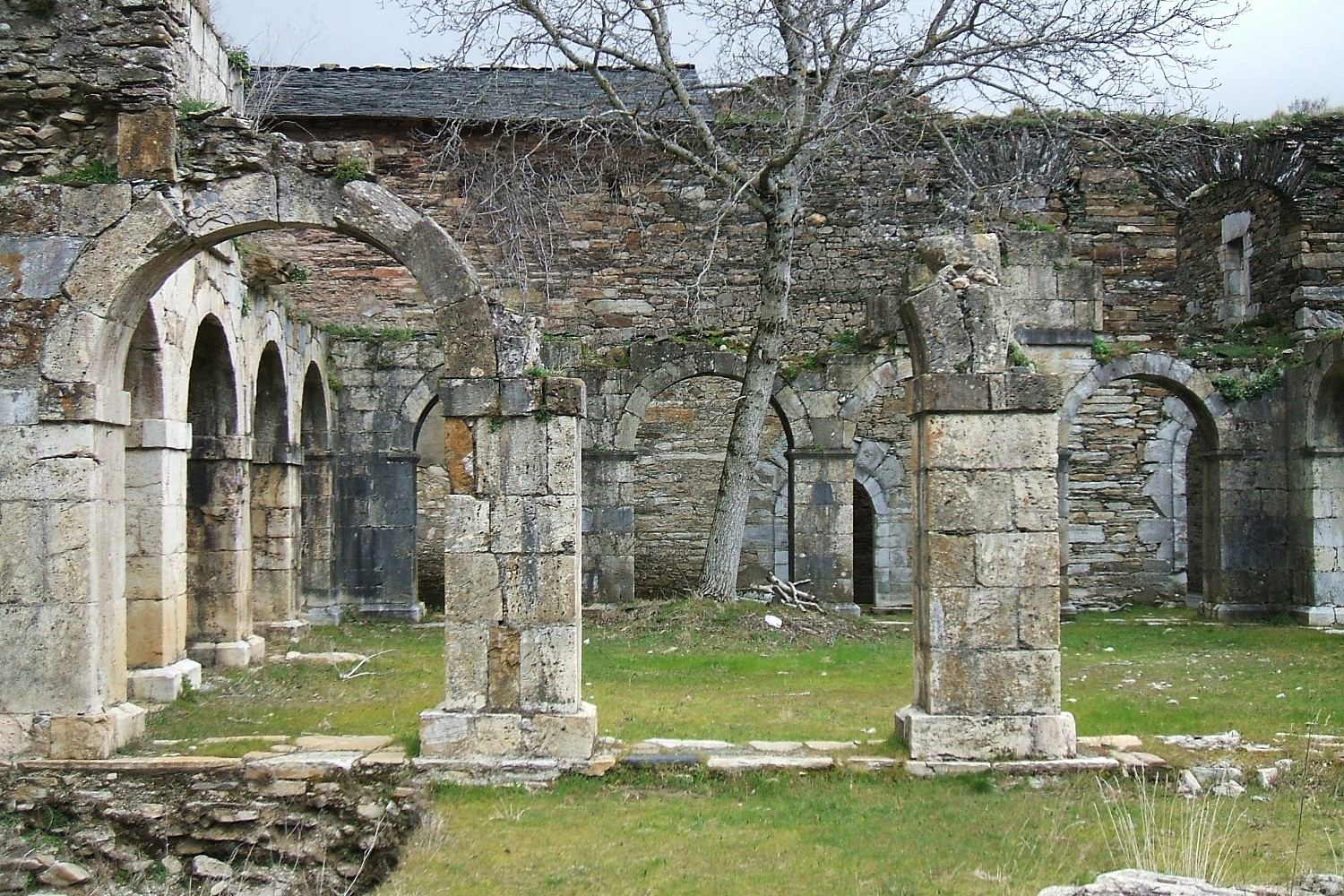 Claustro ruinoso del ex Monasterio de San Pedro de Montes, en Montes de Valdueza, El Bierzo, León, España